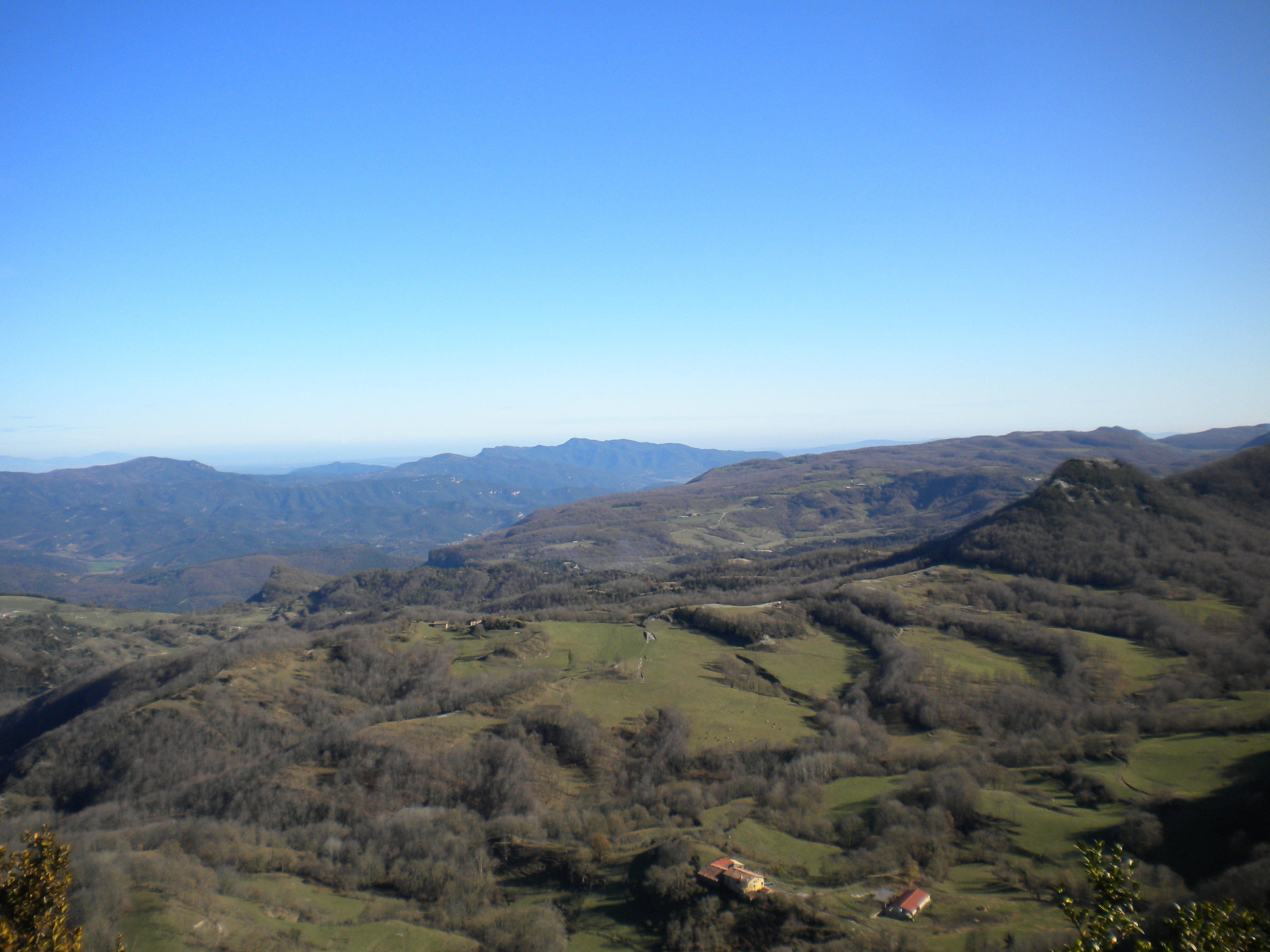 La Serralada Transversal i part del municipi de la Vall d'en Bas des de la Serra de Cabrera, a la Garrotxa.